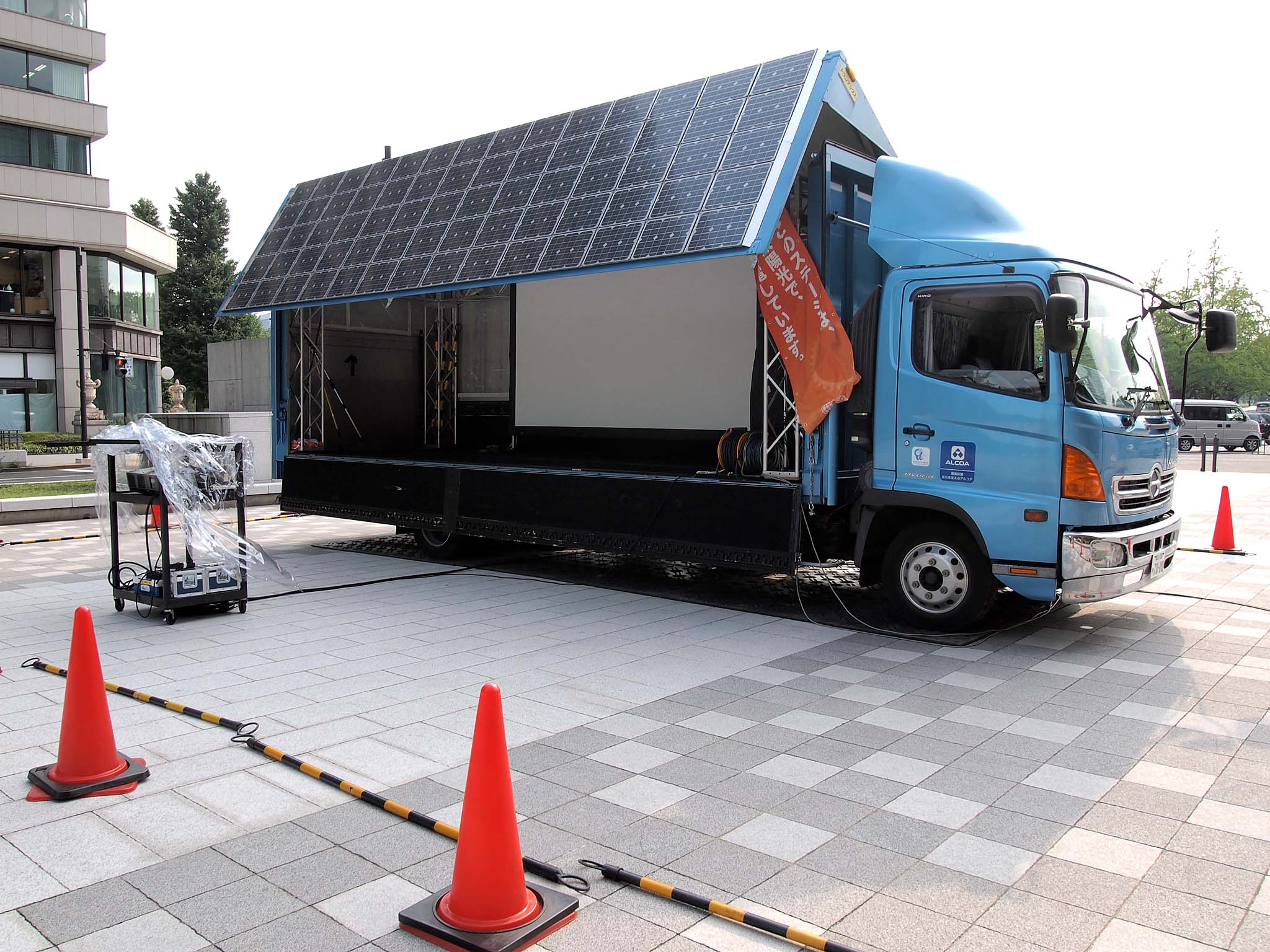 キシムラインダストリーの移動電源車「ソーラーパワートラック」。ウィングボディの外板に太陽電池パネルを装着、野外イベントでの電源供給のほか、荷台をステージとして使うことも可能。 ベース車：日野レンジャーハイブリッド 荷台：トランテックス 最大発電能力：20kwh／日 登録番号：横浜100の7000 撮影地：東京都千代田区丸の内